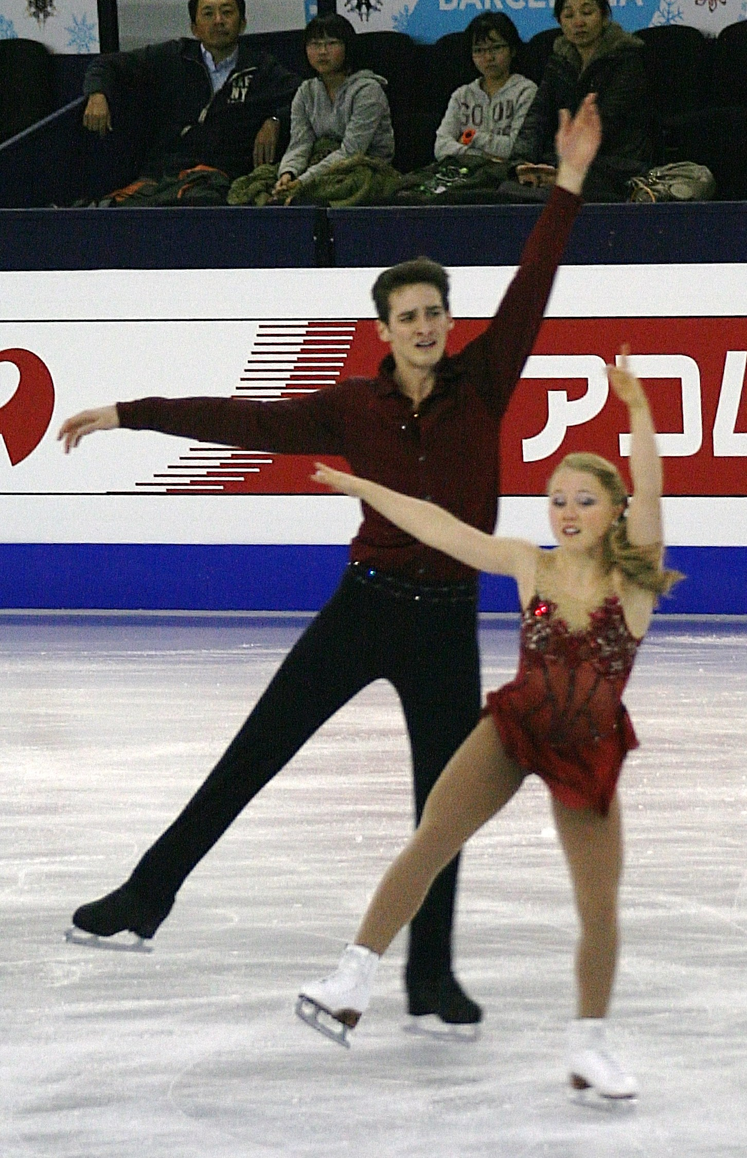 Джулианна Сеген и Чарли Билодо (Канада) на финале Гран-при среди юниоров 2014-2015.